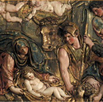 Santa Mariko errataularen xehetasuna, Antxieta, Tafalla